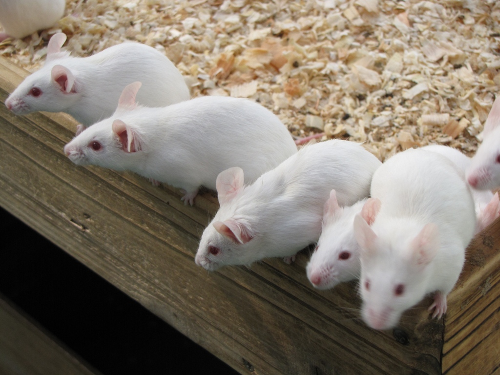 野毛山動物園（横浜市）ふれあいコーナーのハツカネズミ